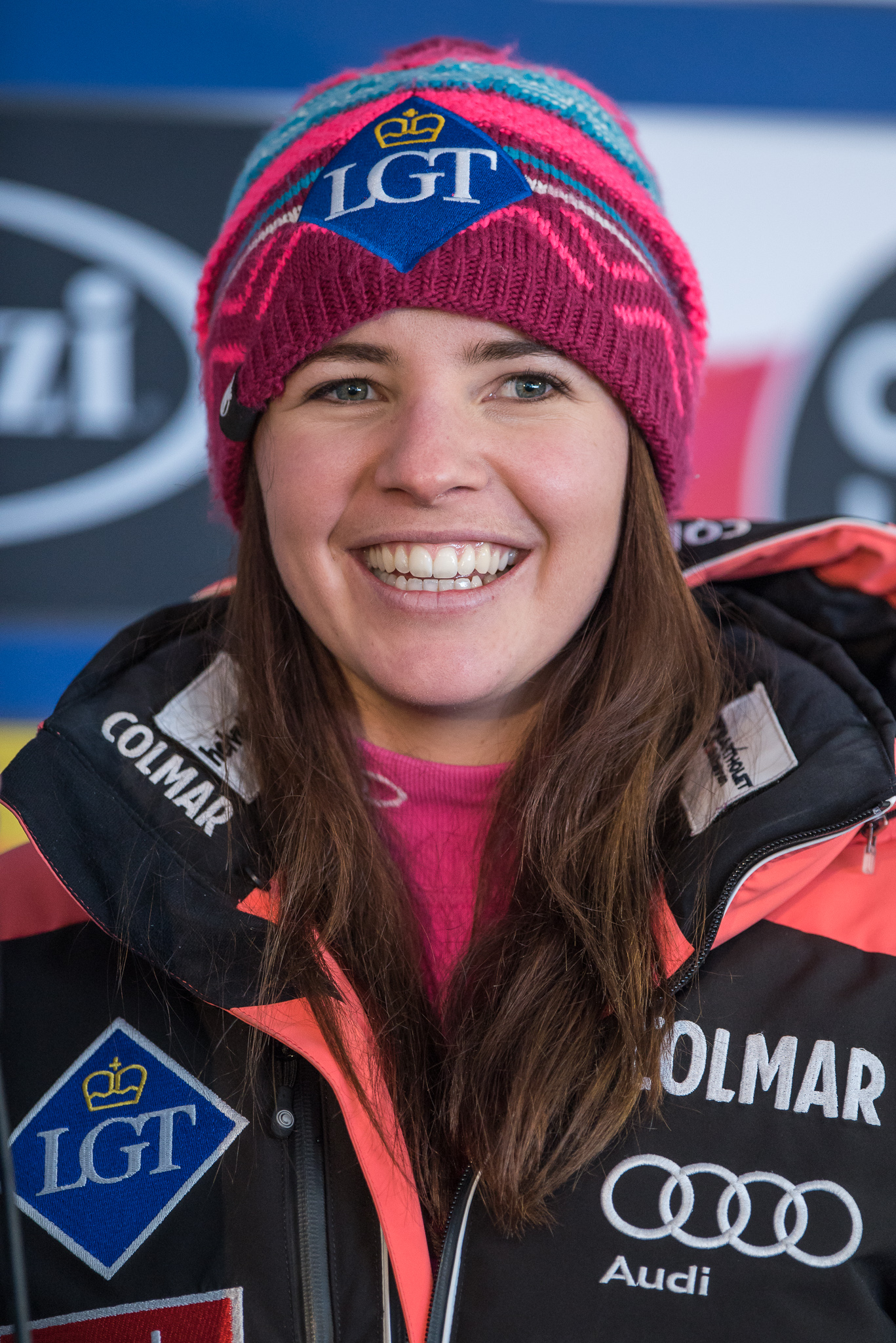 64. Kandahar Rennen,Audi FIS Ski Weltcup Garmisch-Partenkirchen,Damen Super-G,Kandahar,Ladies Super-G,Tina Weirather